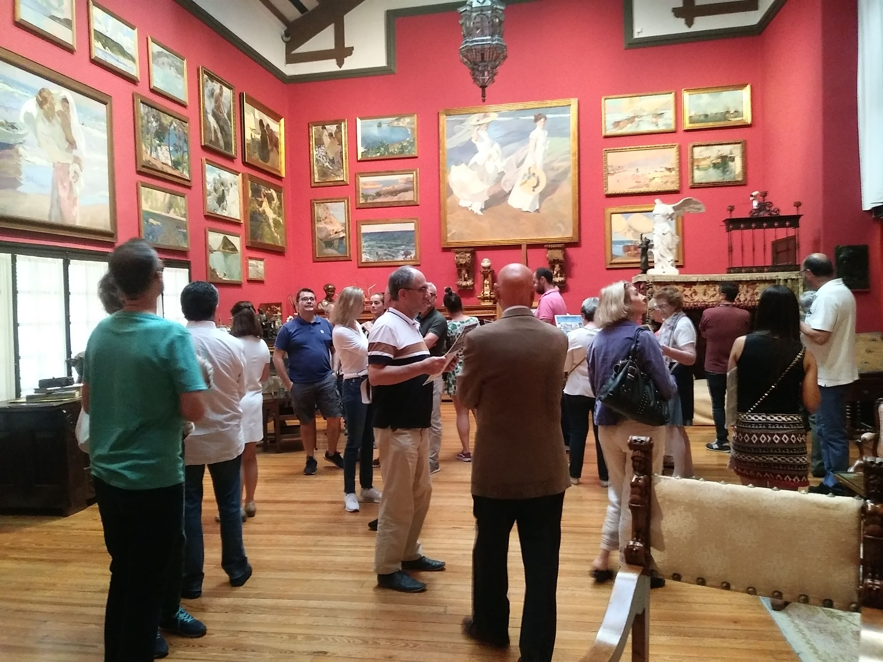 Un grupo de visitantes a un museo